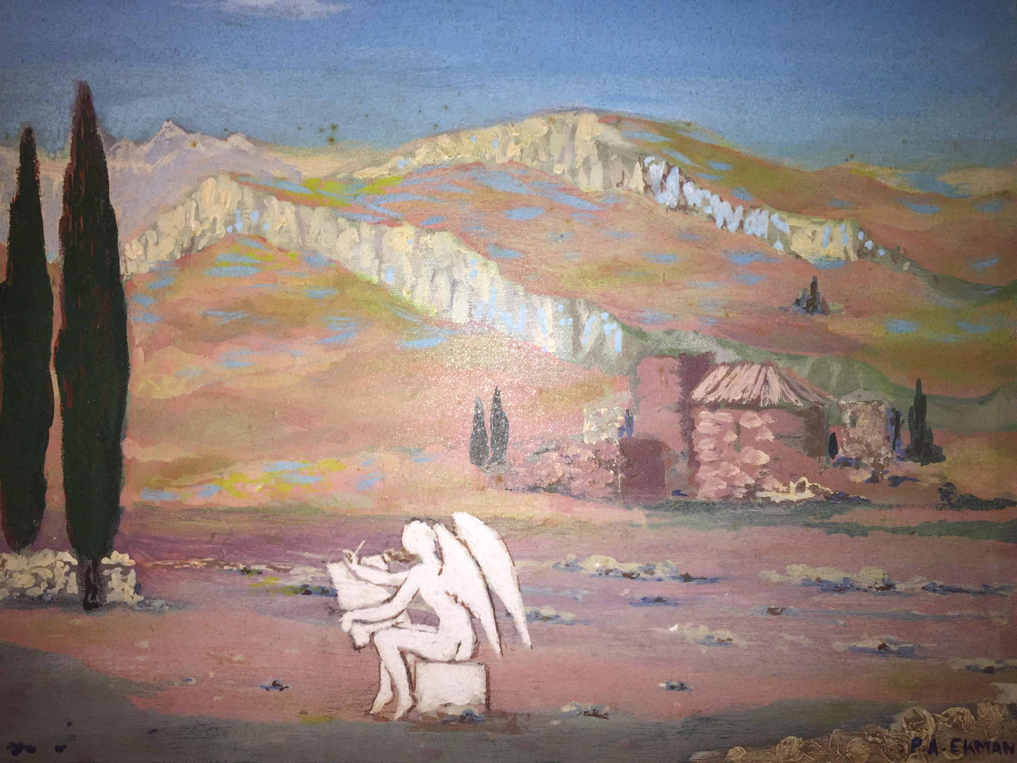 peinture 40 x 50